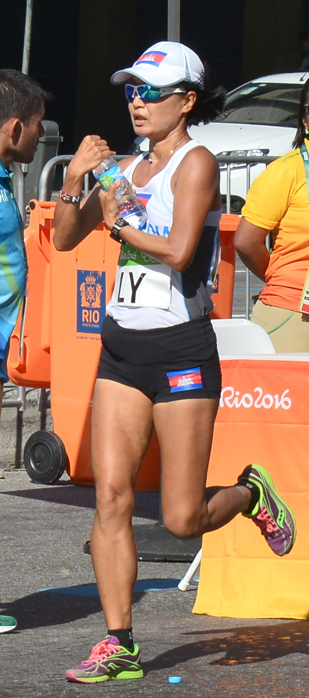 Passage du marathon des jeux olympiques de Rio 2016 dans le centre de Rio